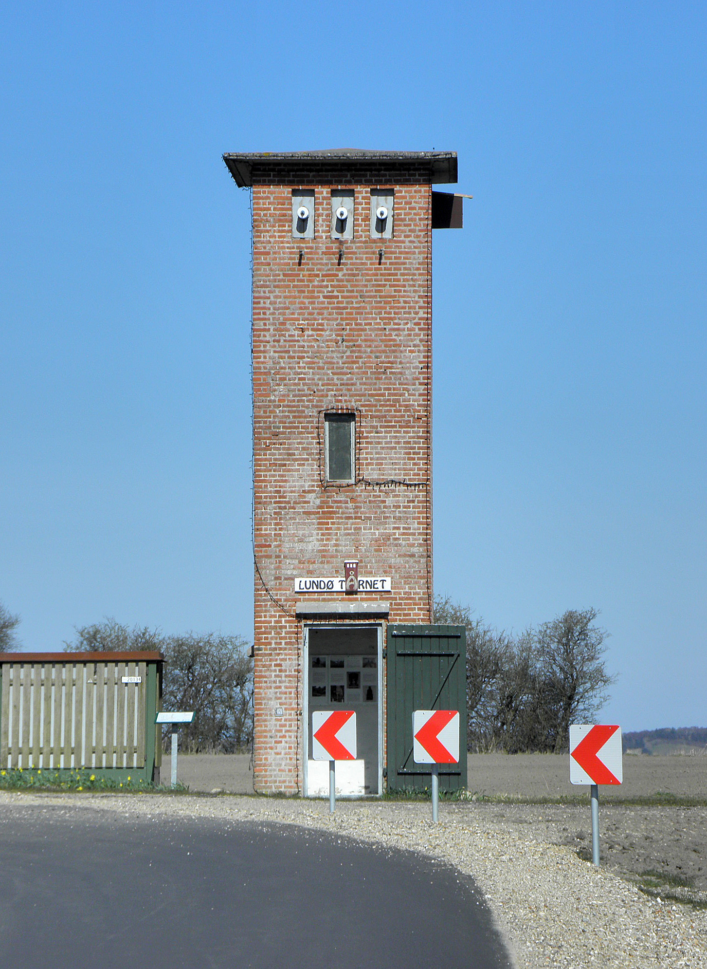 Foto af Lundø Tårnet photograph Dorrit Hvam, Kjellerup, Denmark, OLYMPUS DIGITAL CAMERA